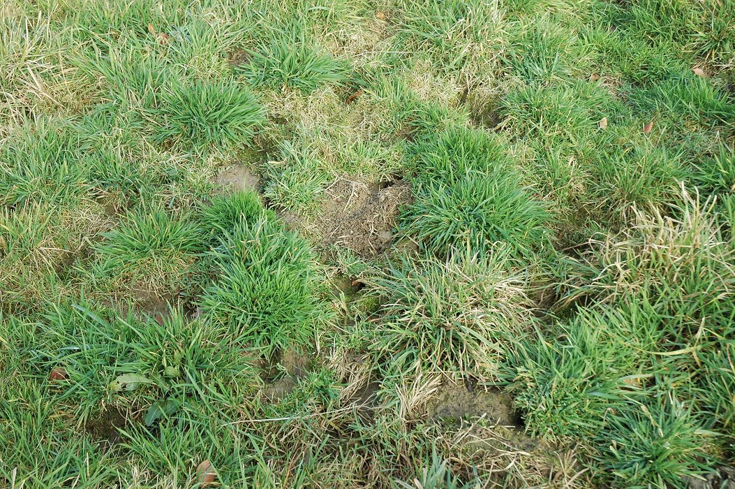 Schäden durch Feldmäuse (Microtus arvalis) auf einer Weide, November 2007, Ort: Hess. Oldendorf (Niedersachsen)